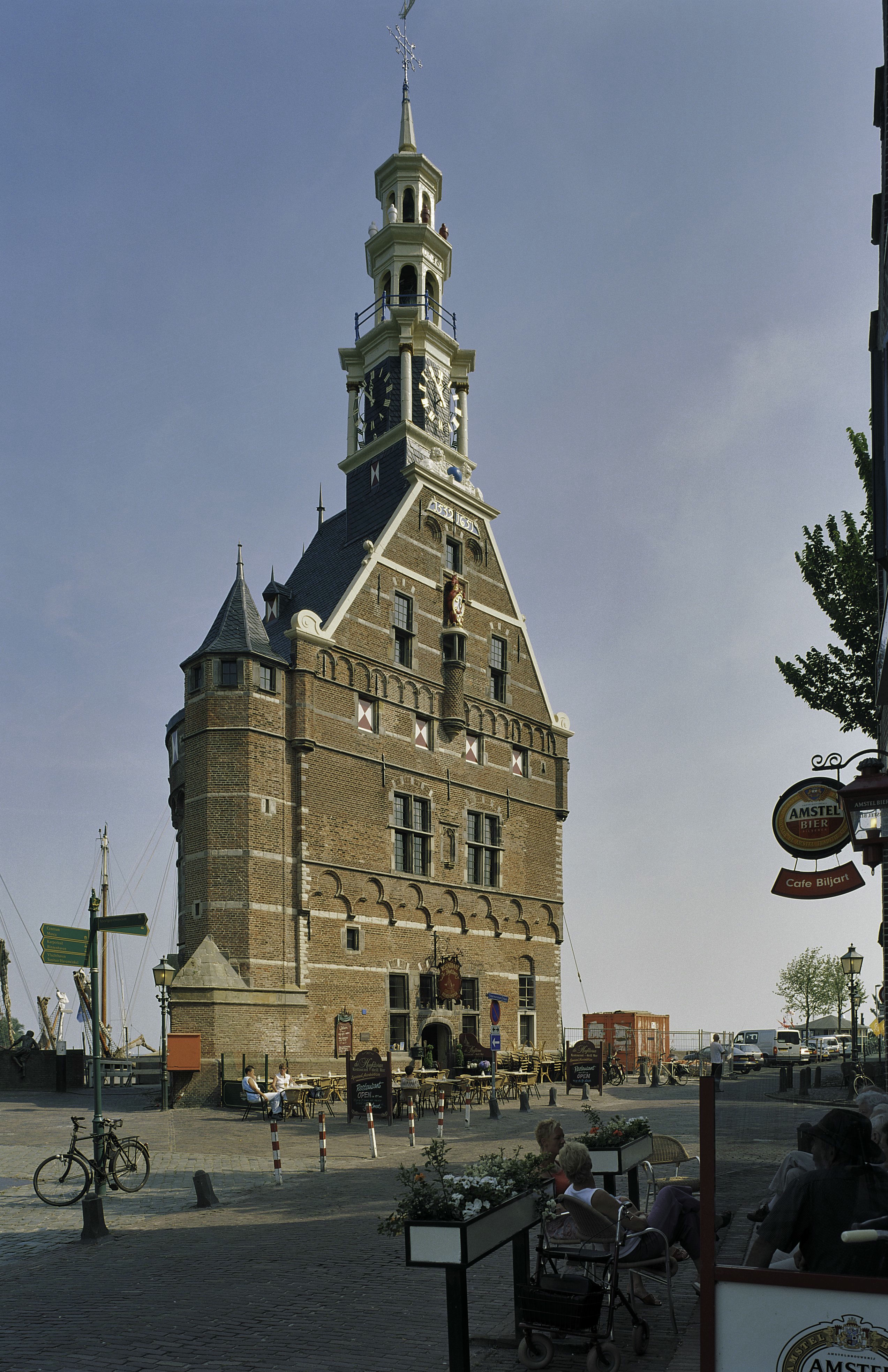 Hoofdtoren: Overzicht Hoofdtoren, westzijde (opmerking: Boek: "66 Kanjermonumenten")